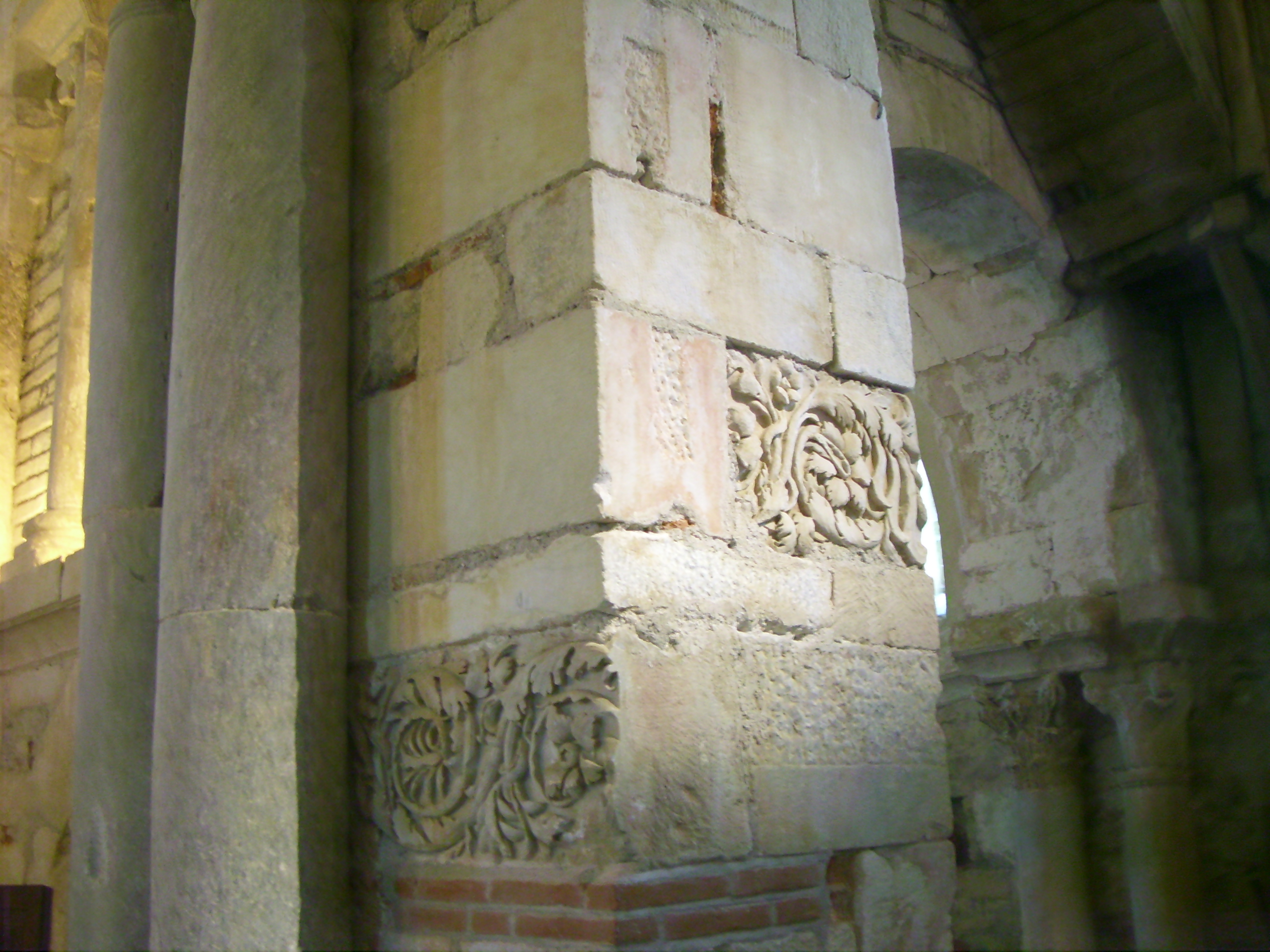 Remploi de blocs romains provenant de la cité de Lugdunum Convenarum (Saint-Bertrand-de-Comminges) pour la construction de la basilique Saint-Just de Valcabrère : ici, deux frises